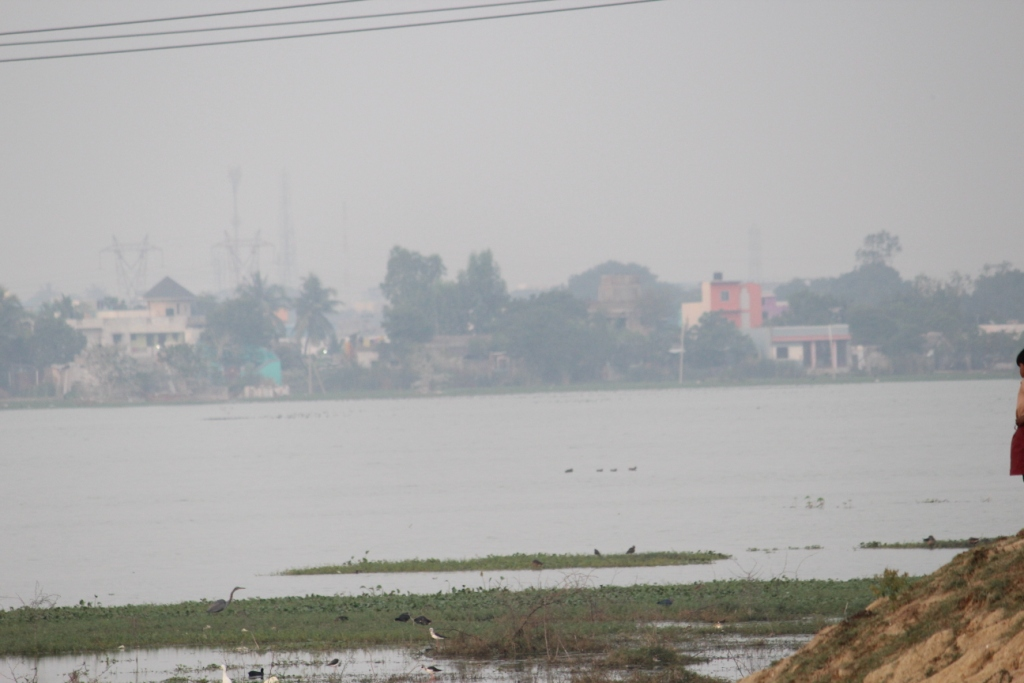 கொரட்டூர் எரி